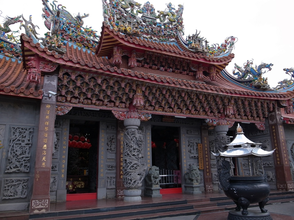 桃園縣新屋鄉笨港村的天后宮，是清光緒四年，由黃吳水等三十人各出穀一石做基金而創立，所奉祀的媽祖神像，是由南部北港朝天宮香火分來的，天后宮有一尊天上聖母的神像，是全世界最高的，約有十丈高。